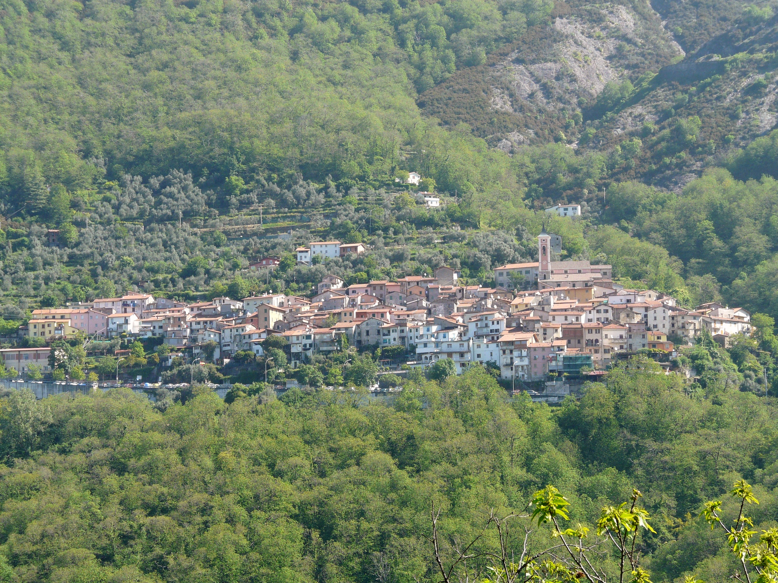 Panorama di Antona, Massa, Toscana, Italia